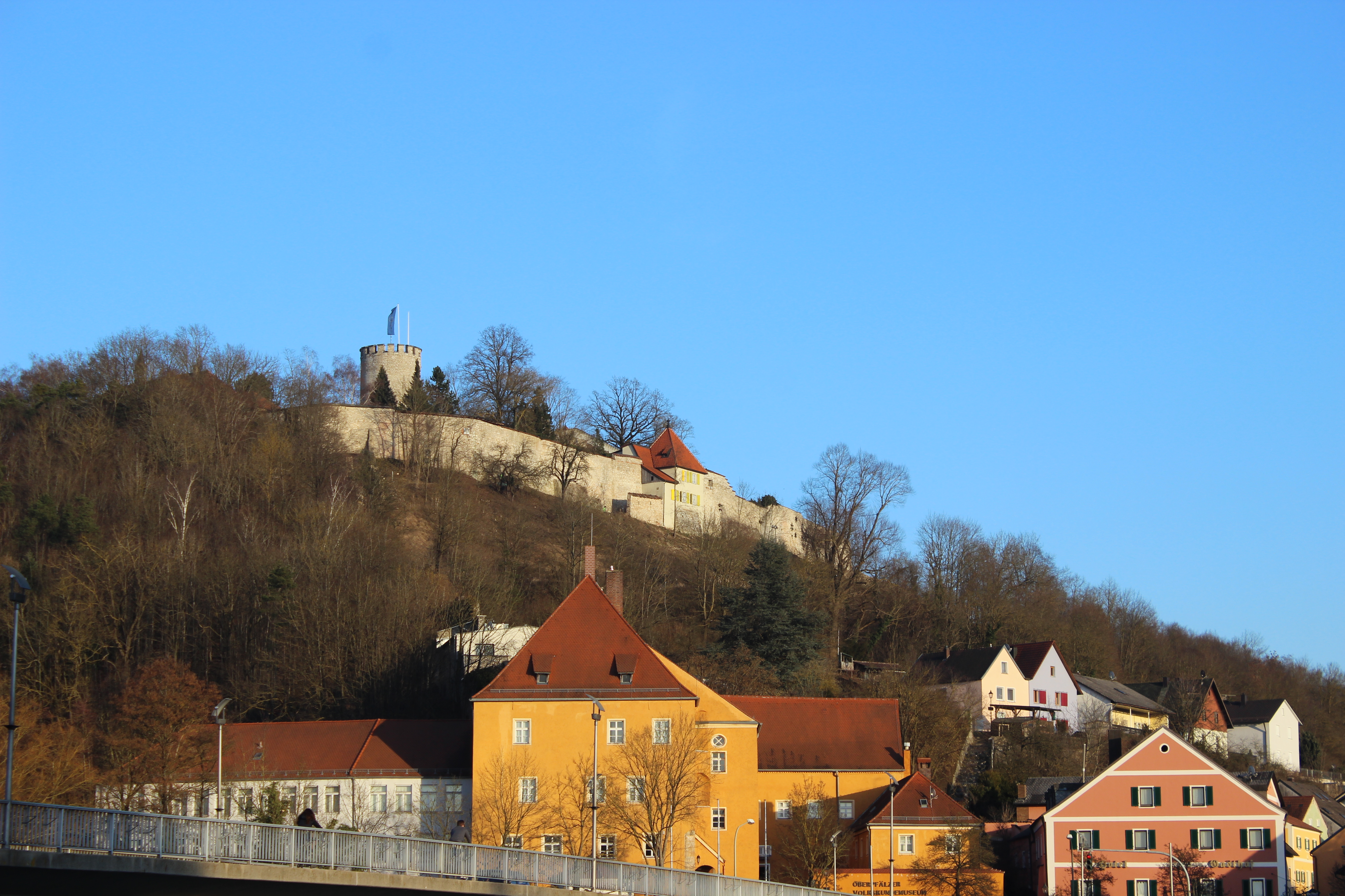 Zu sehen ist die Burg und der dazugehörige Burgberg von Burglengenfeld. Das orange Gebäude am Fuße des Berges ist das Volkskundemuseum.